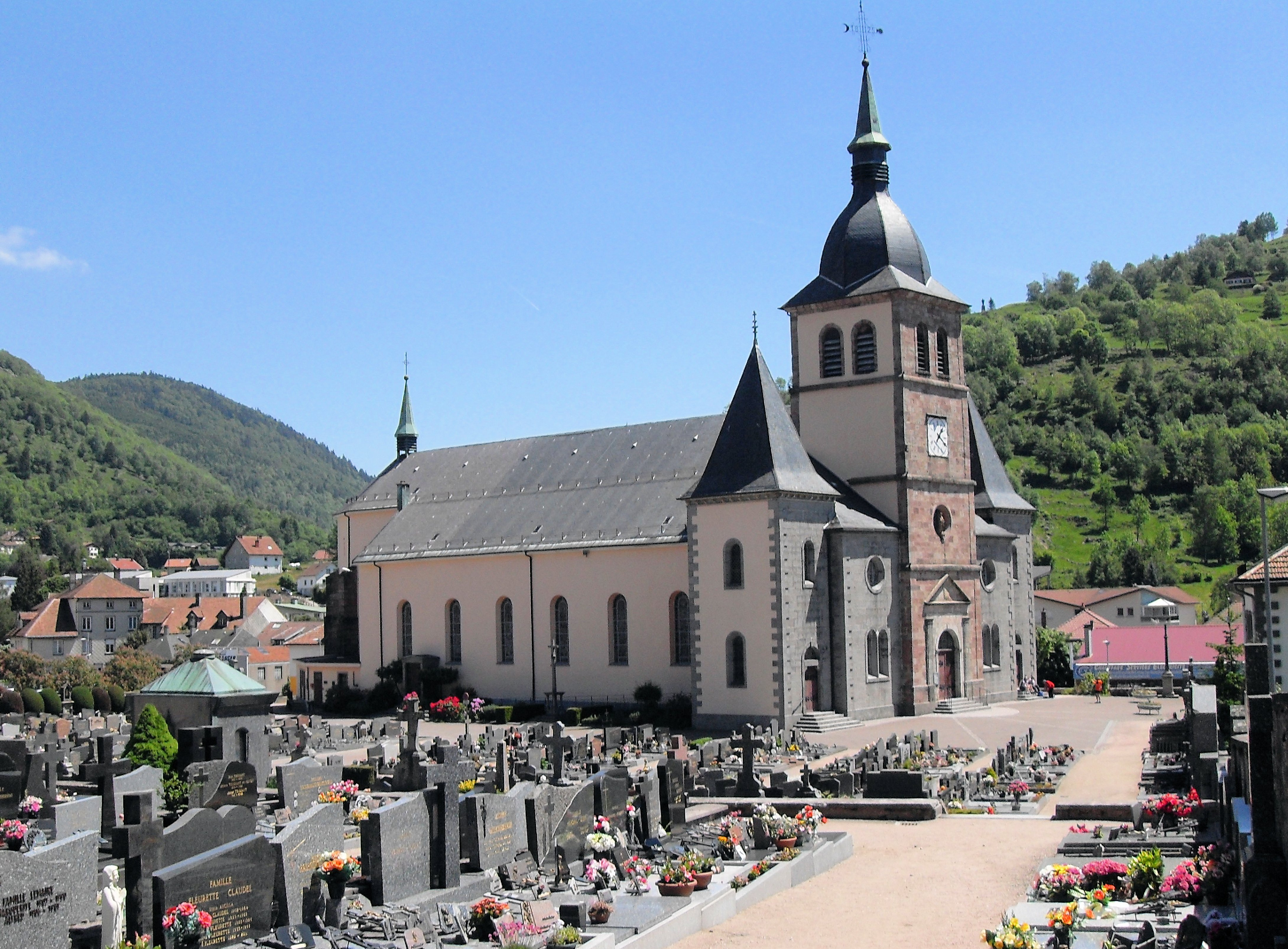 L'église Saint-Laurent de La Bresse, côté sud-ouest